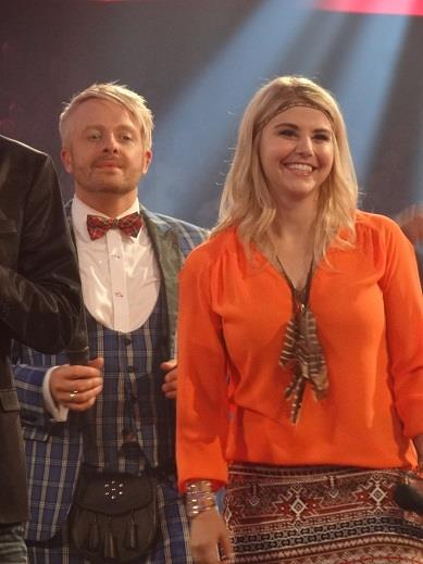 Ross Antony und Beatrice Egli bei Die Besten im Sommer